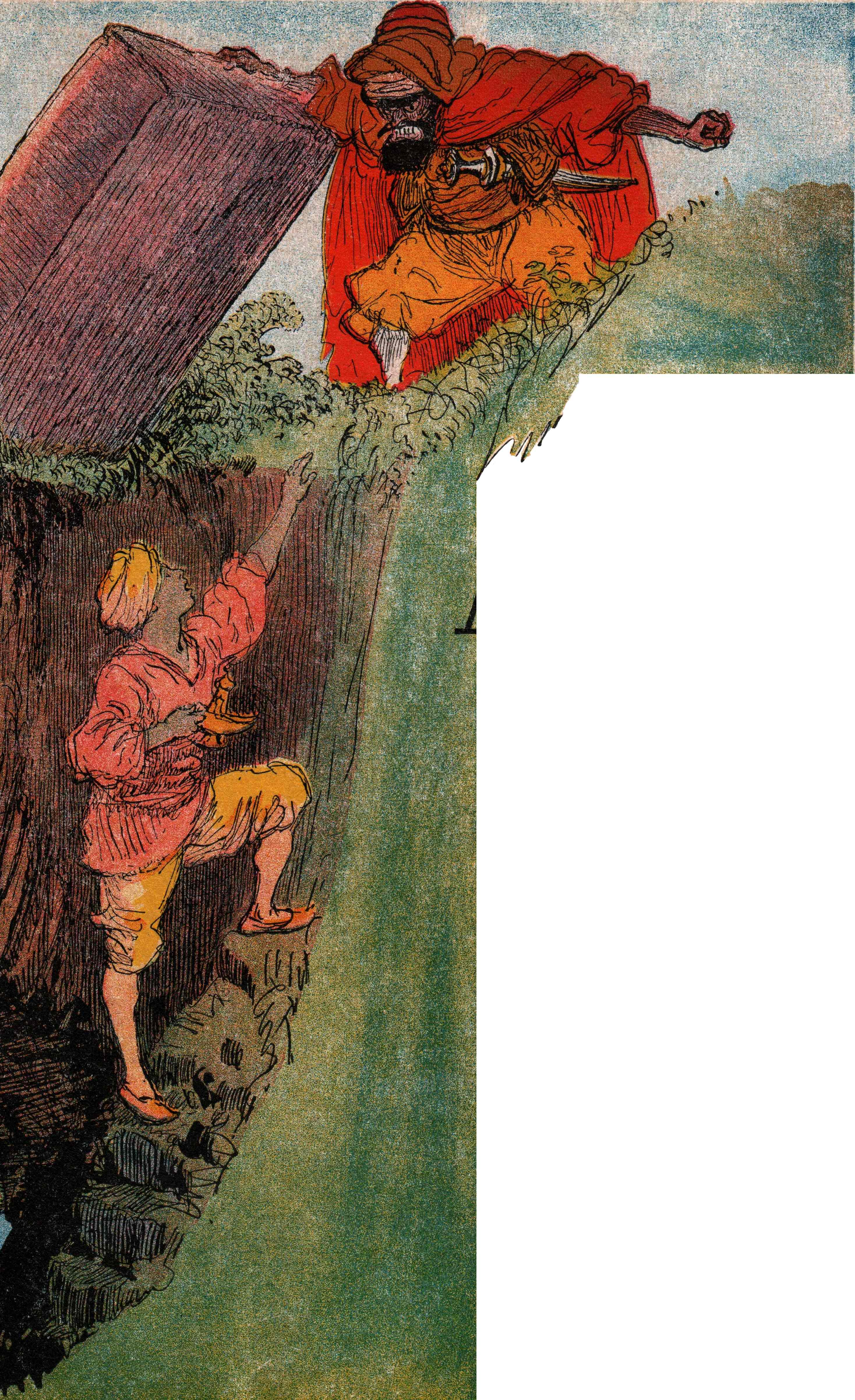 Aladin - illustré par Albert Robida - Paris - Imagerie merveilleuse de l'Enfance - Illustration de la page 1